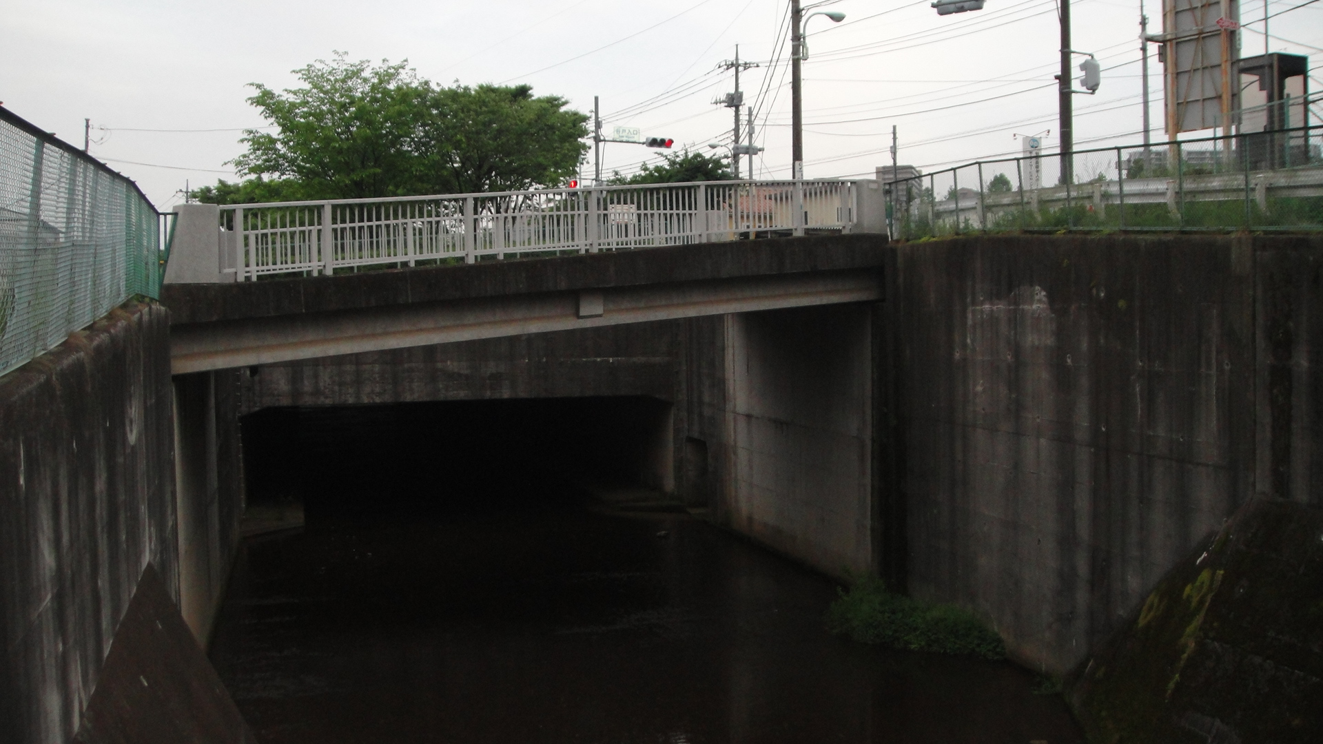 大栗川上流の都道20号との交差地点